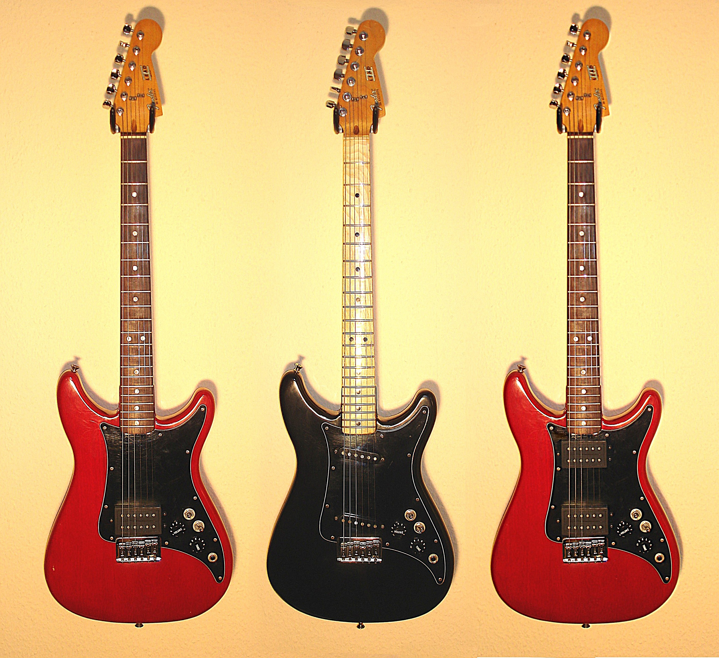 Die drei Modelle der Fender Lead-Serie (v.l.n.r.: Lead I, Lead II, Lead III)